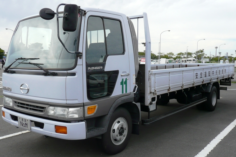 全国白バイ安全運転競技大会にて撮影。